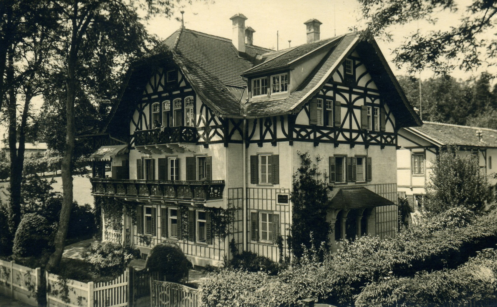 Stammhaus des Baugeschäfts in Tutzing